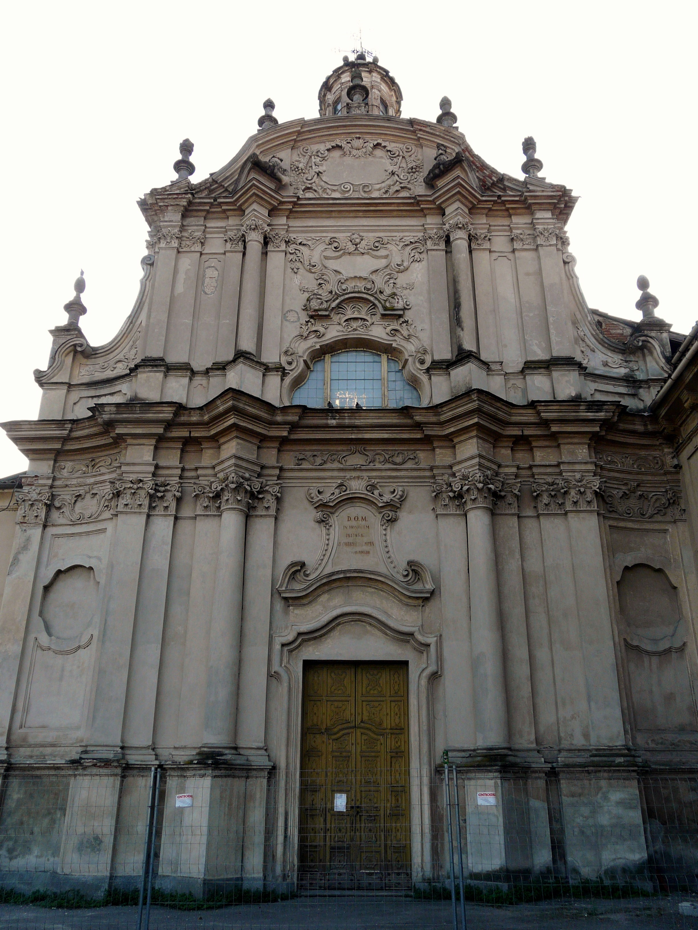 Chiesa di Santa Caterina, Casale Monferrato, Piemonte, Italia